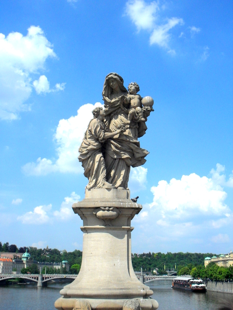 Święta Anna Samotrzecia na moście Karola w Pradza